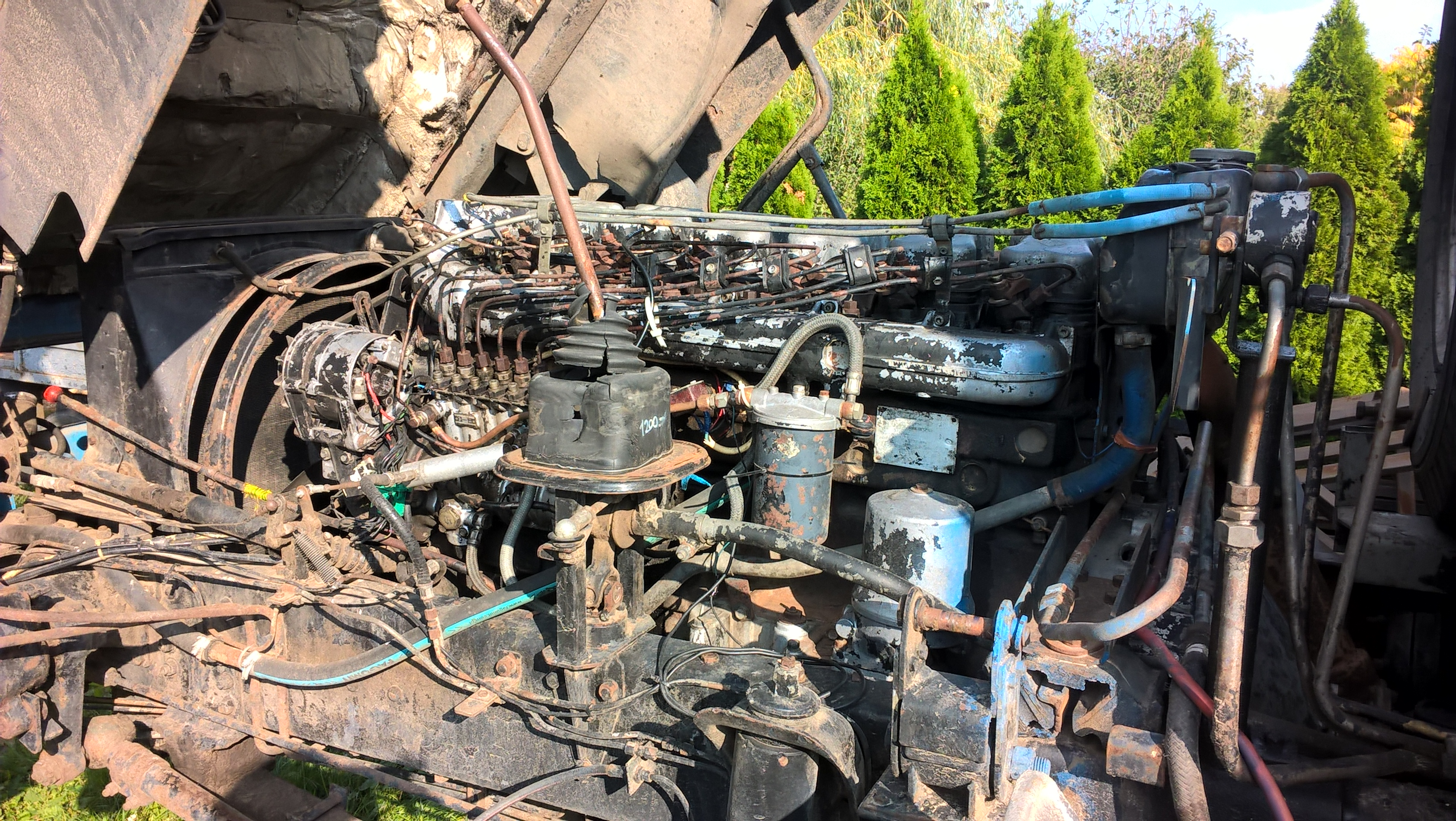 IFA L60 megbillentett kabinnal, valamint az erőforrás